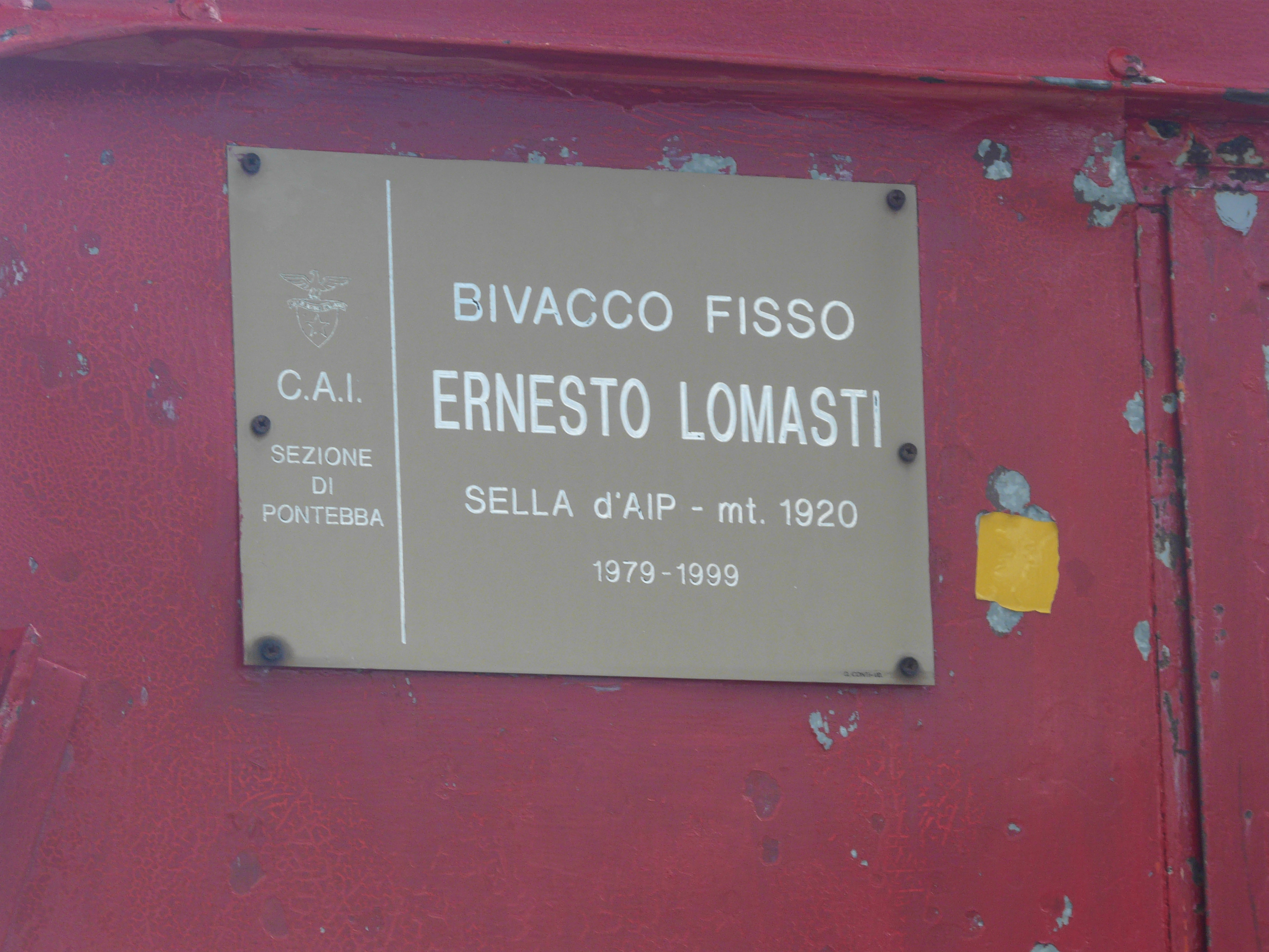 Das Hüttenschild der Biwackschachtel.